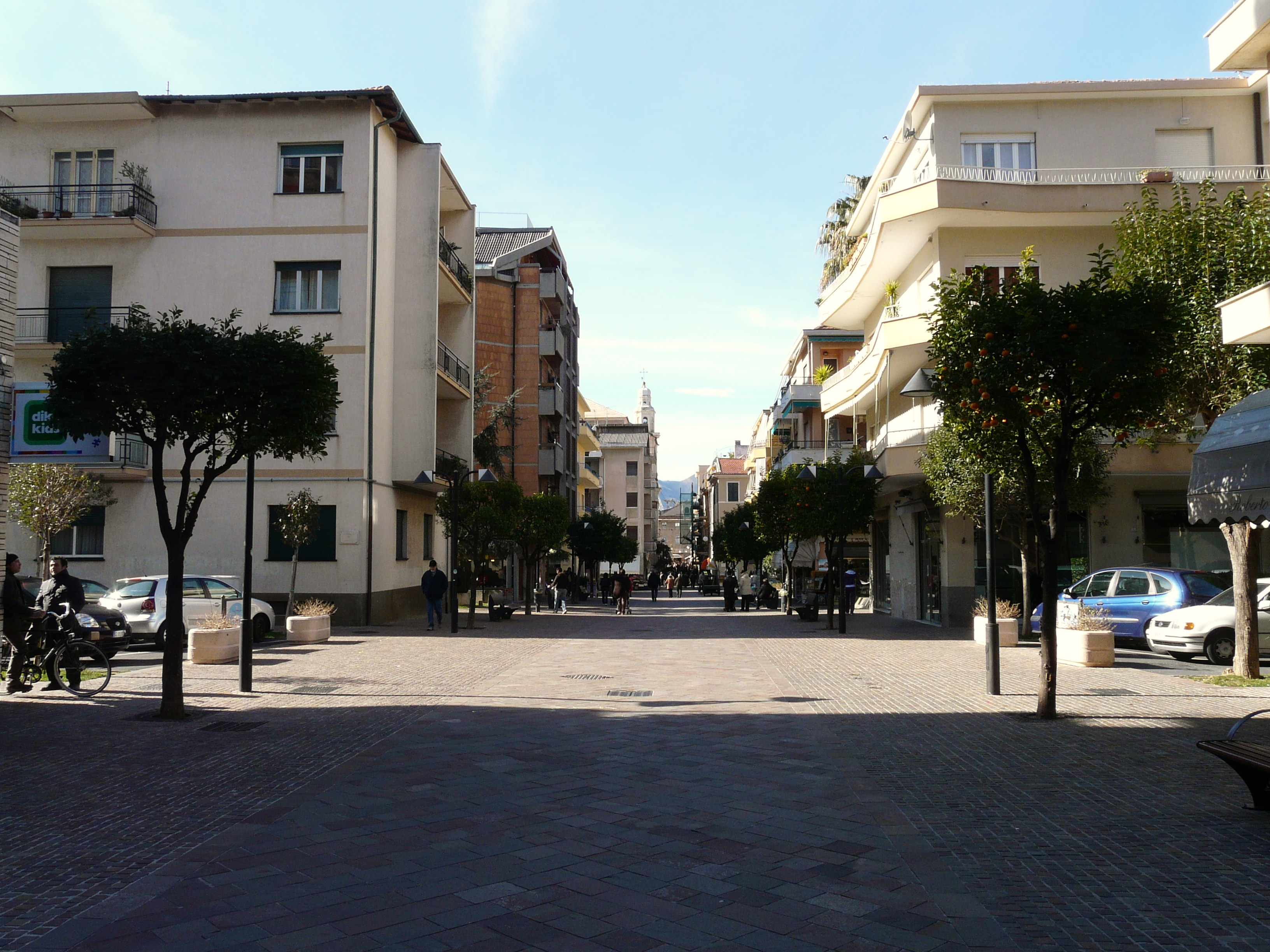 Centro storico di Pietra Ligure, Liguria, Italia